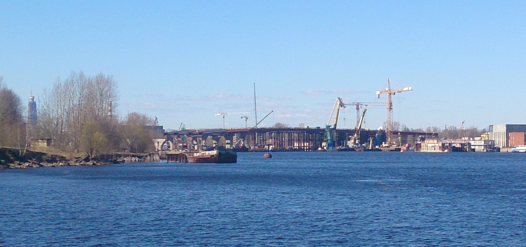 Процесс строительства нового моста через Малую Неву